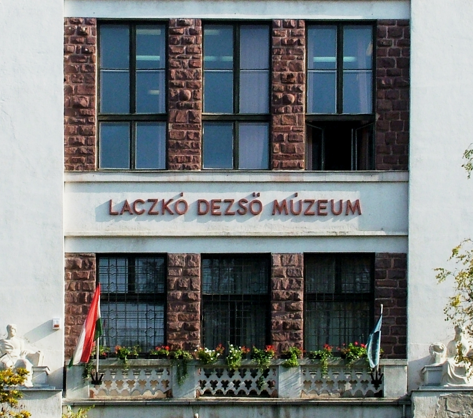 Veszprém, Laczkó Dezső Múzeum: homlokzatrészlet, amely Medgyaszay István tervezői stílusának a modern építészeti formaalakítási fejlődésére utal (szalagszerű ornamentika)